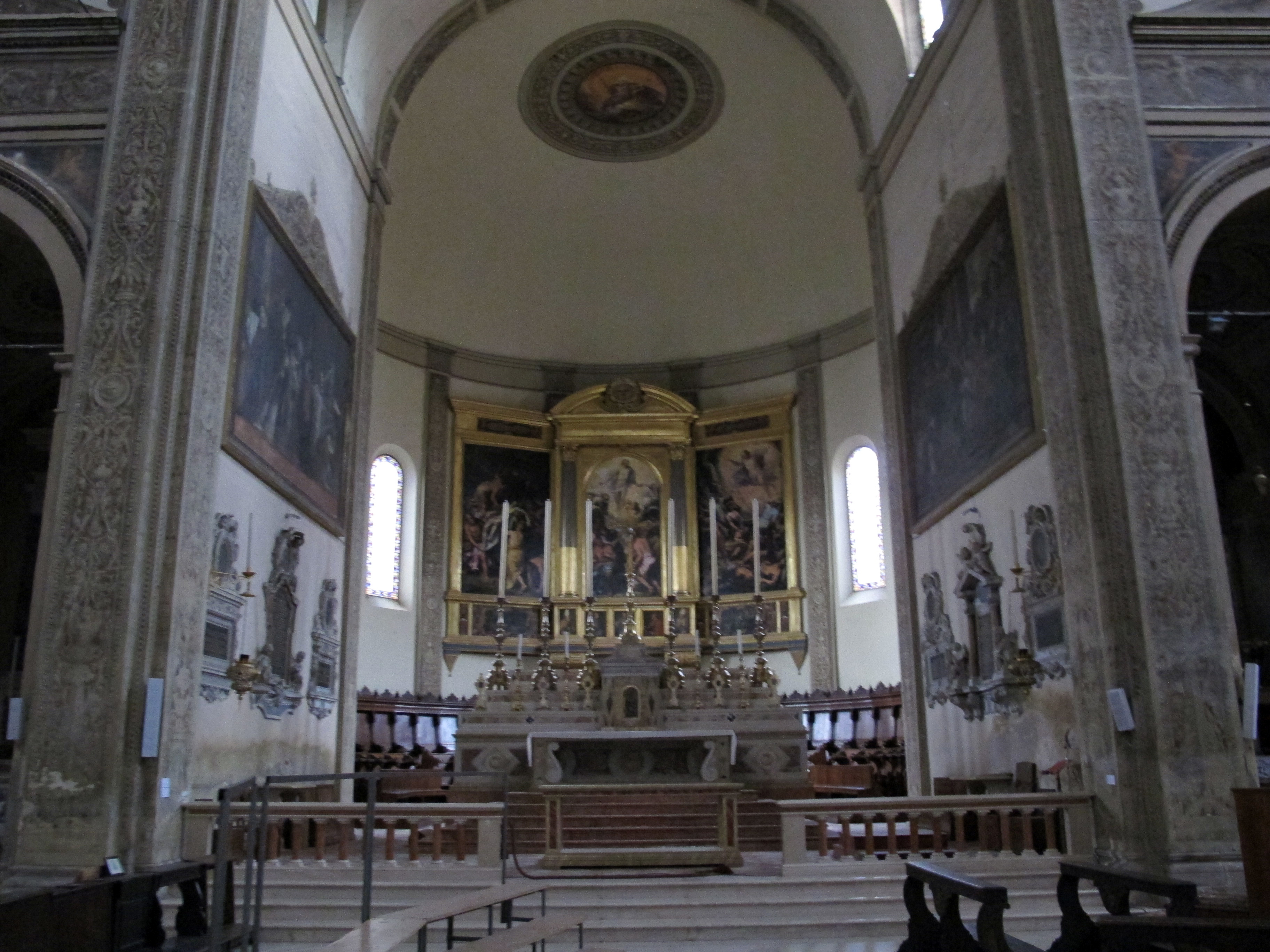 Ferrara